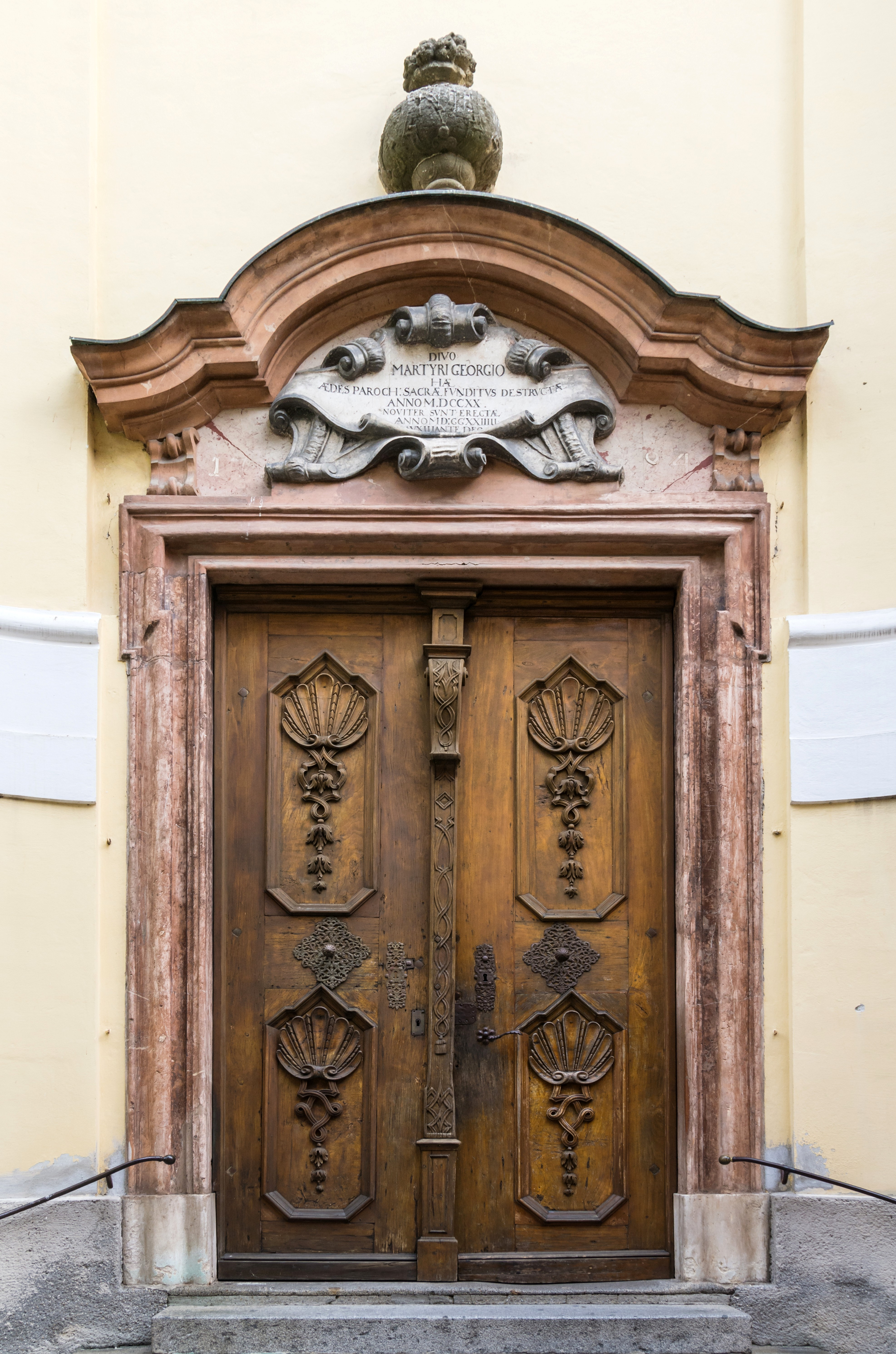 Kath. Pfarrkirche hl. Georg und Kirchhof